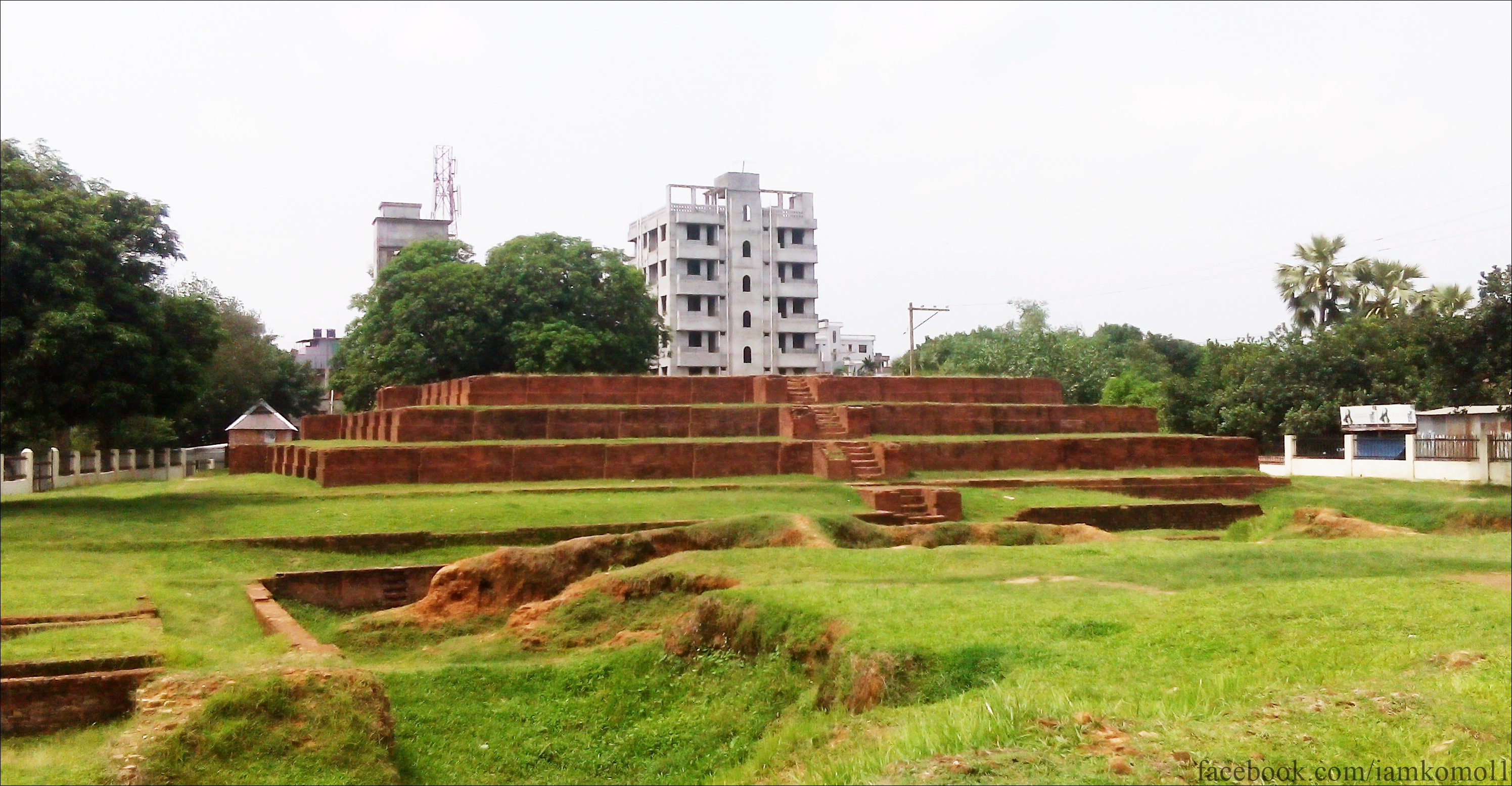 রাজা হরিশচন্দ্রের প্রাসাদ